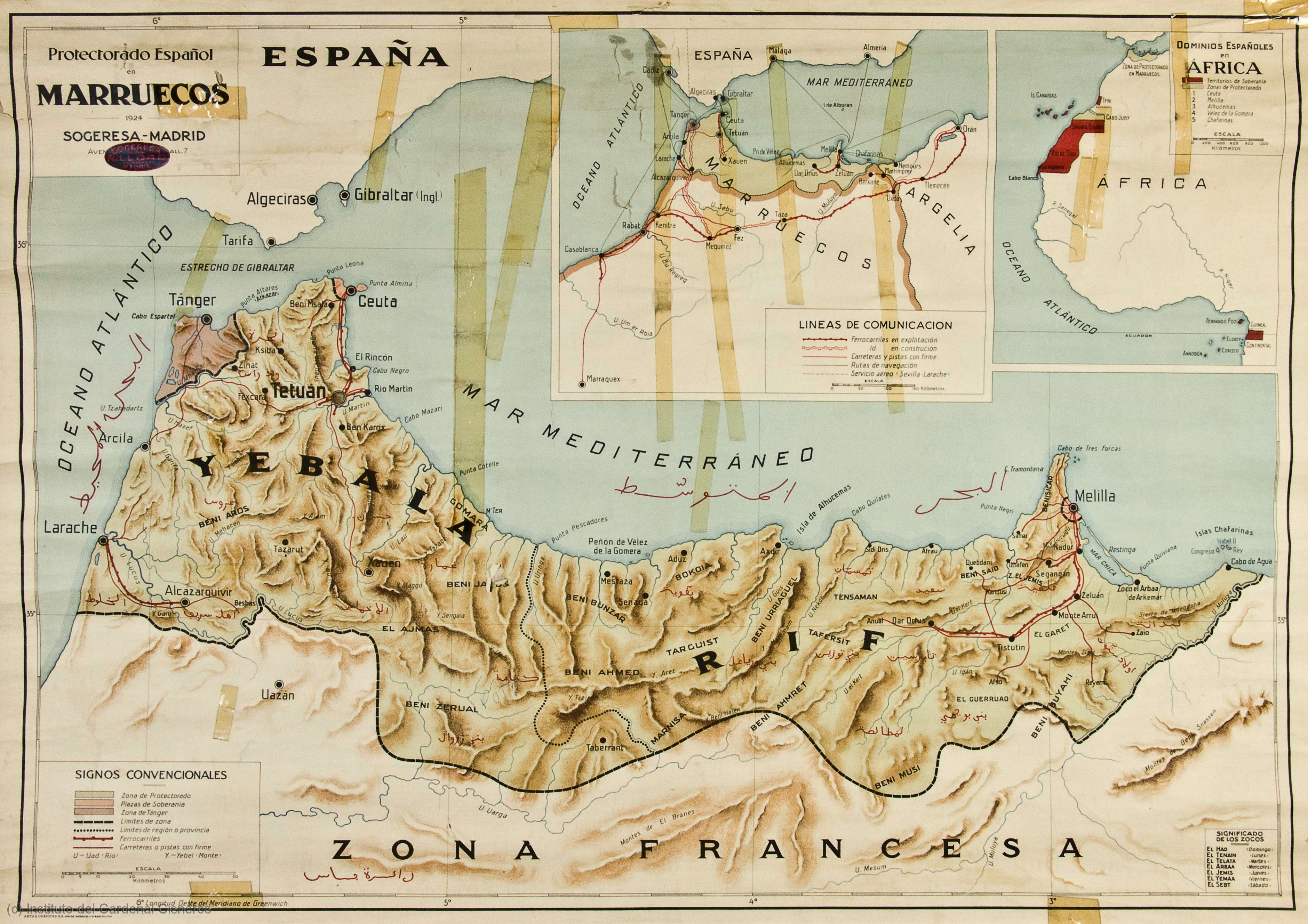 Mapa del Protectorado Español en Marruecos. Publicado por Sogeresa en Madrid en1924